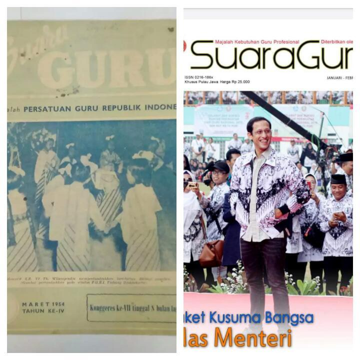 cover majalah suara guru edisi tahun 1950 dan tahun 2020